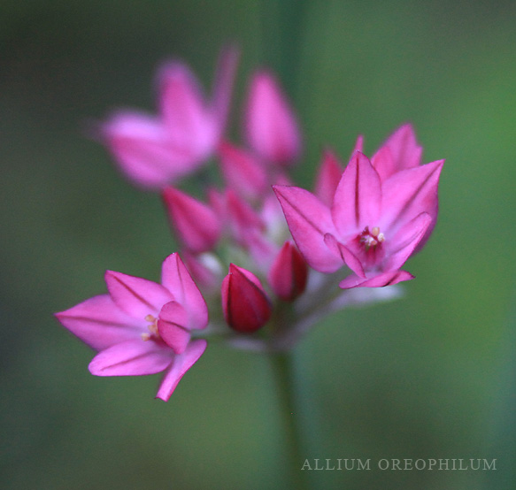 Лук горолюбивый